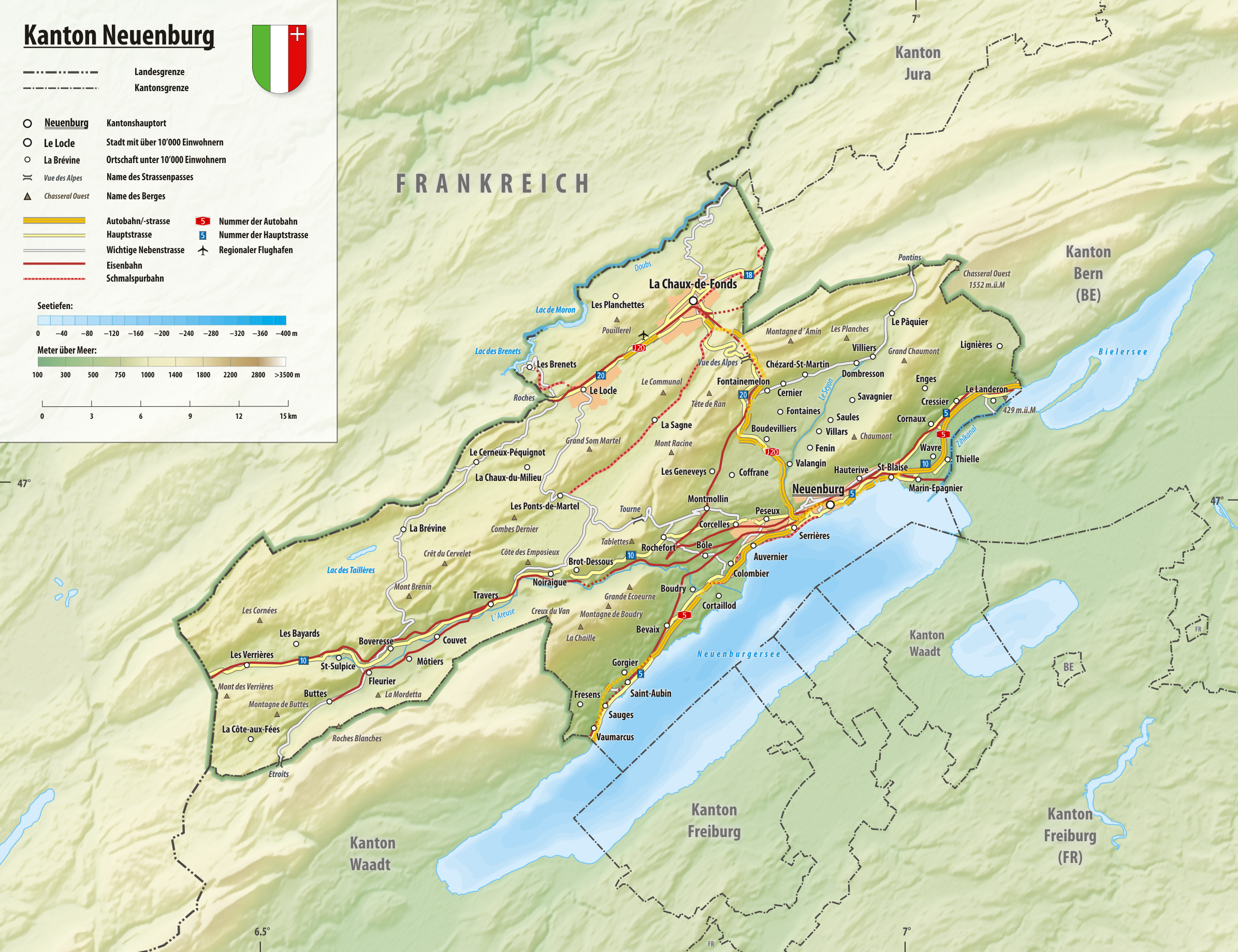 Reliefkarte des Kantons Neuenburg Topographischer Hintergrund: NASA Shuttle Radar Topography Mission (public domain). SRTM3 v.2.